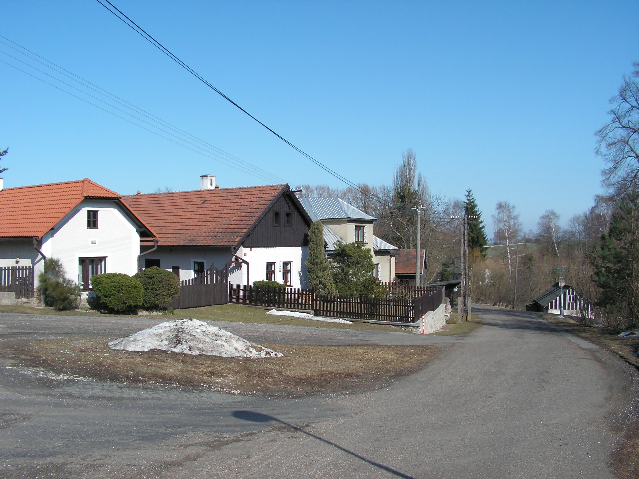 Česky: Dědice se nacházejí západně od Dobrovítova v okrese Kutná Hora.